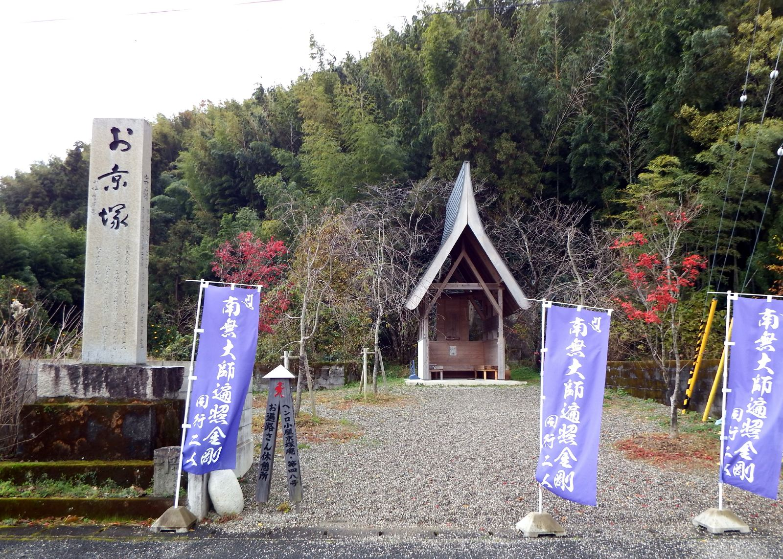 徳島県小松島のお京塚